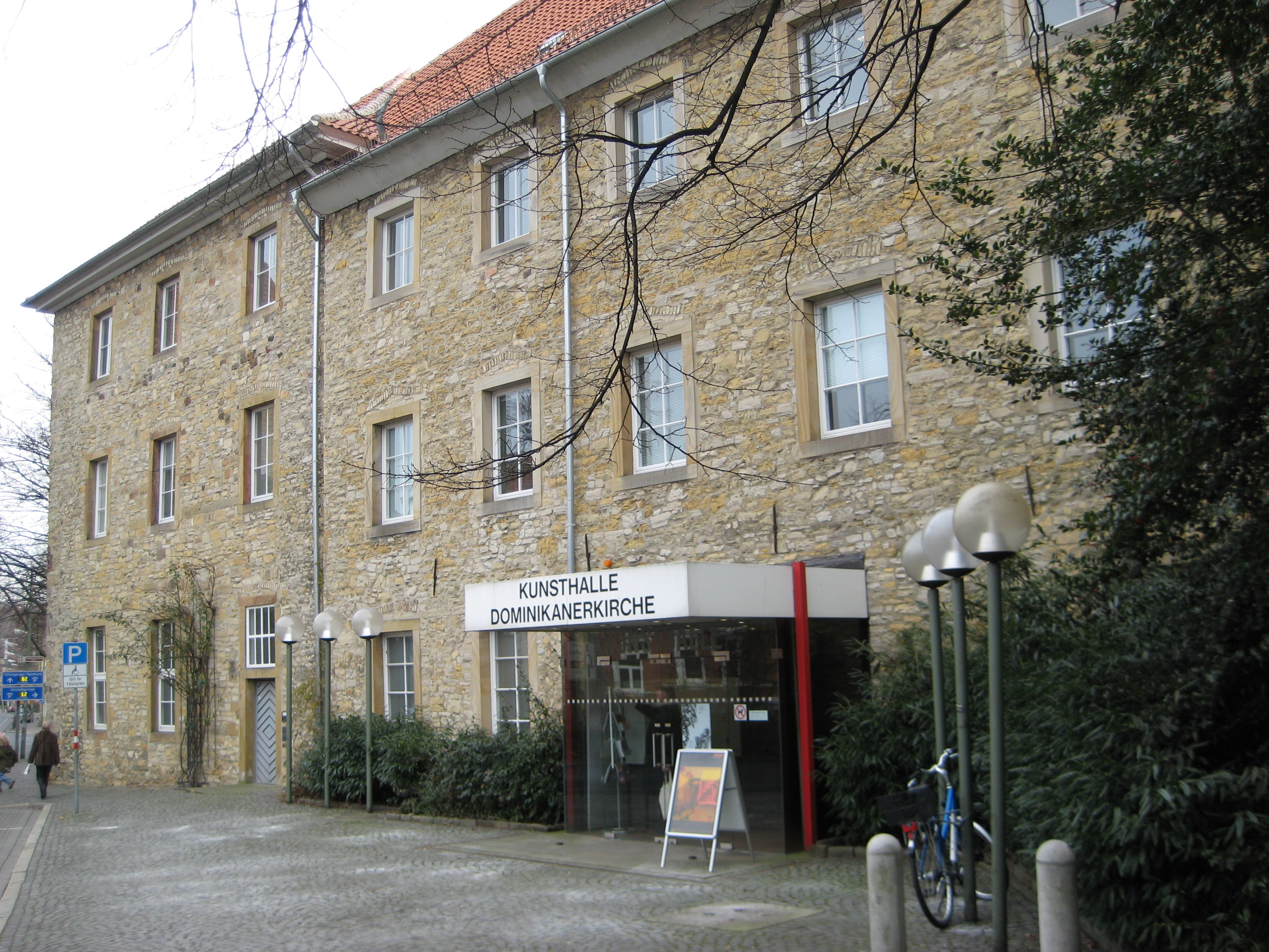 Dominikanerklöster in Osnabrück, siehe Kunsthalle Dominikanerkirche